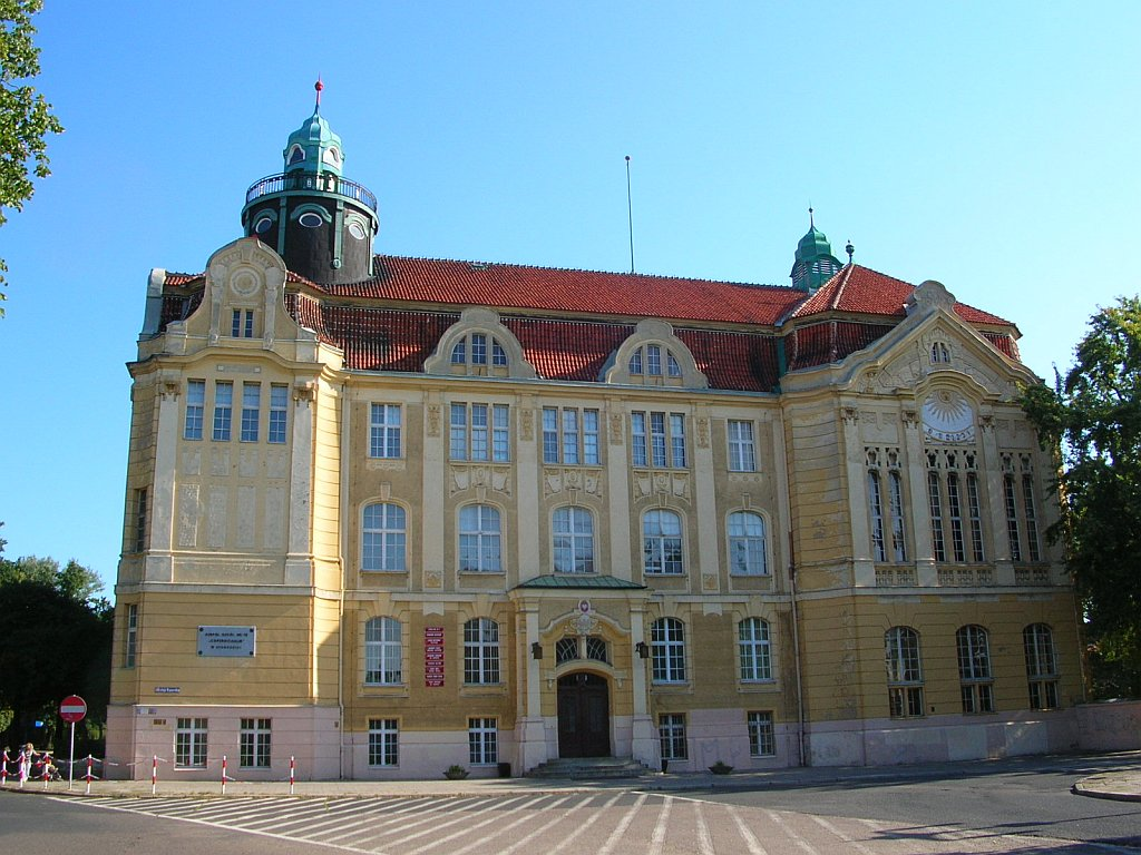 Gmach Copernicanum w Bydgoszczy